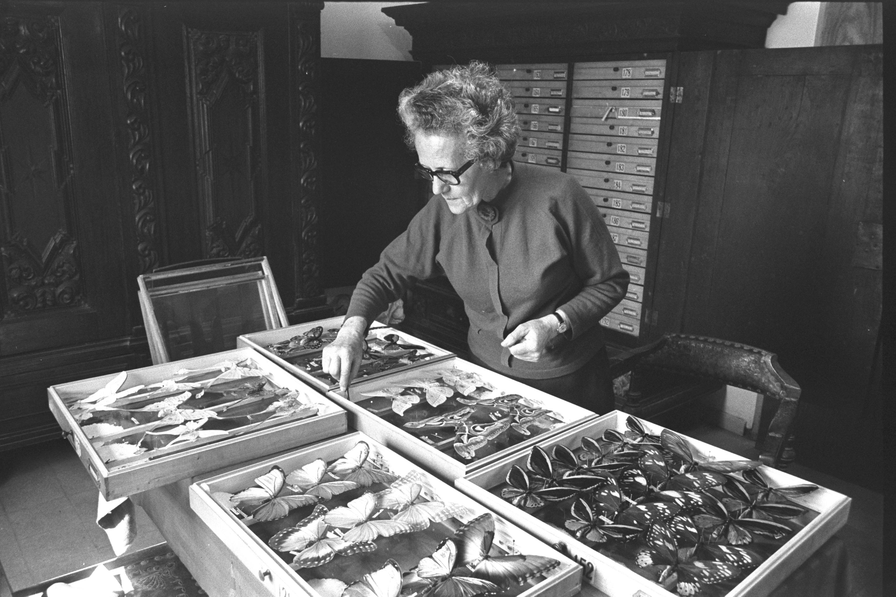 Esther Melamed, a member of Kibbutz Glil Yam, takes care of the 80-year-old collection of butterflies inherited by the kibbutz. אסתר מלמד, חברת קיבוץ גליל ים, מסדרת את אוסף הפרפרים שניתן לקיבוץ בירושה